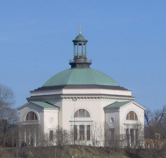 Skeppsholmskyrkan i Stockholm, Sweden.